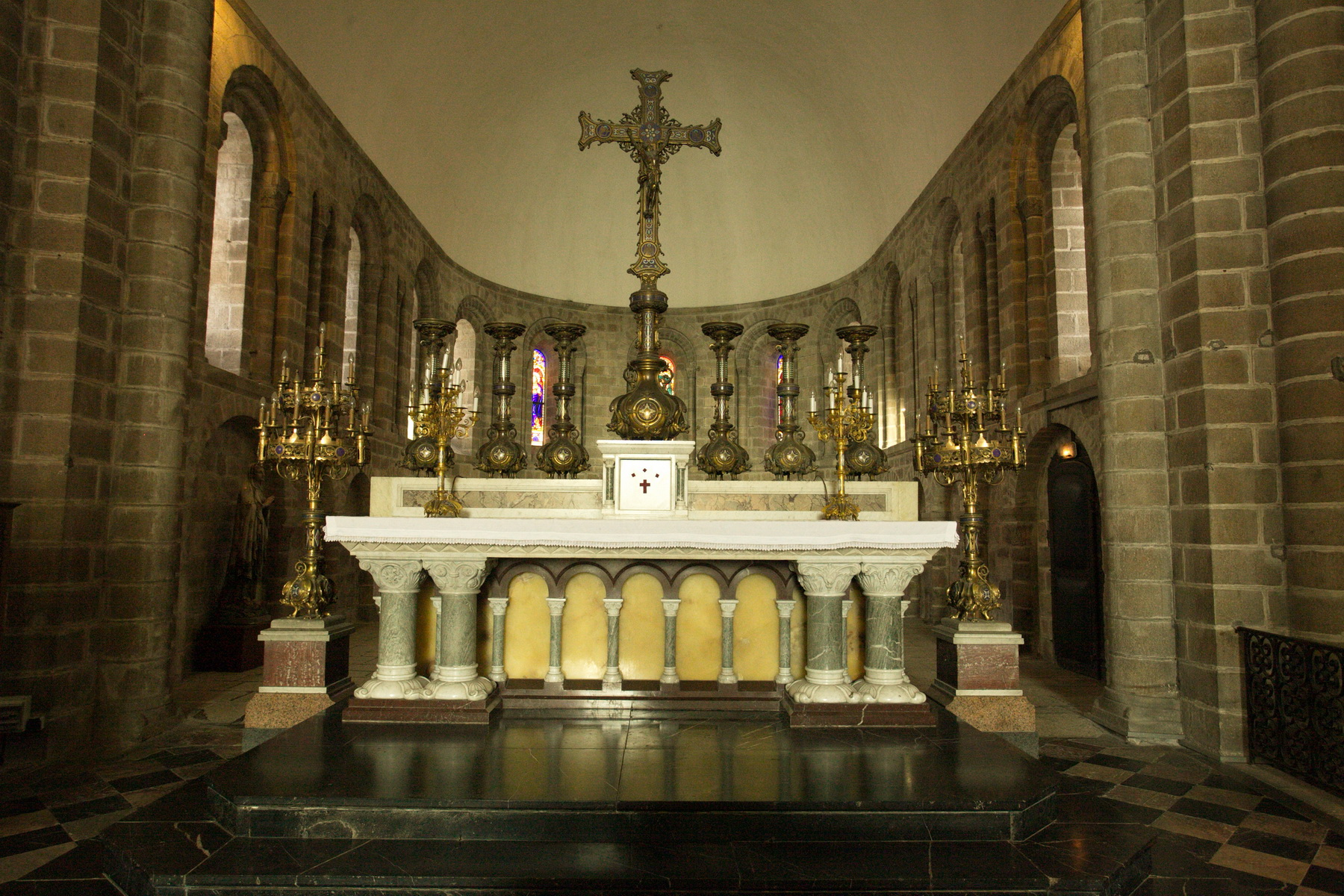 Abbaye Sainte-Croix à Quimperlé (Finistère, France) (ClasséInscrit). . Sont classés objets M.H. l'imposante croix d'autel et les deux candélabres placés sur des socles de part et d'autre de l'autel, œuvres de l'orfèvre parisien Placide Poussielgue-Rusand vers 1865.